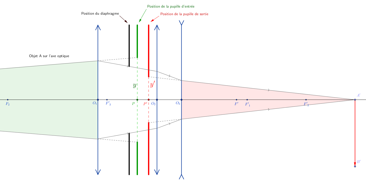 Illustration faisant apparaître les pupilles d'entrée et de sortie pour un système optique constitué de trois lentilles minces.